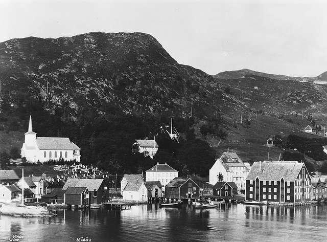 Måløy med Sør-Vågsøy kyrkje